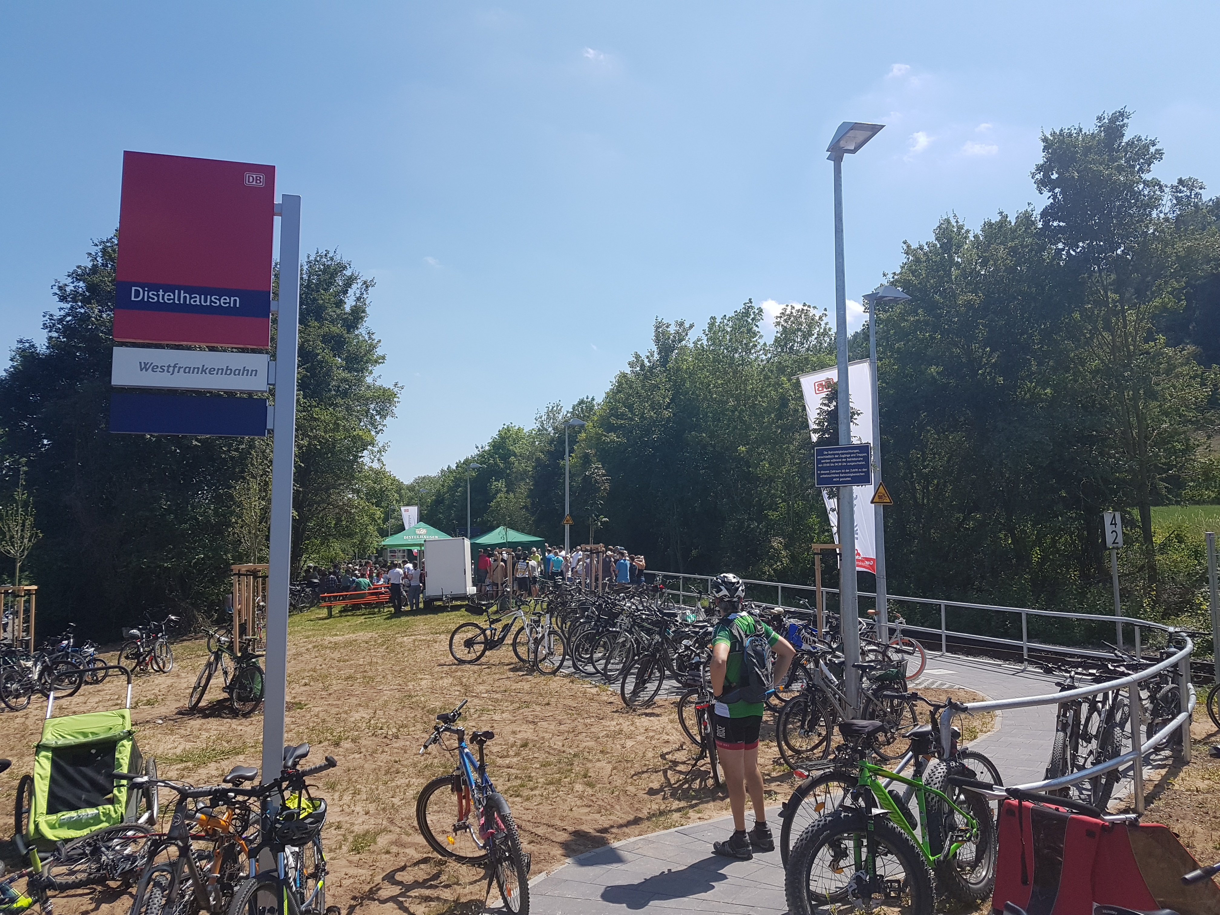 Hintergrund zur Radwette im Rahmen der Einweihung des neuen barrierefreien Bahnsteiges in Distelhausen: Die Westfrankenbahn hatte gewettet, dass es Distelhausen nicht schaffen würde, 30 Radfahrer mit einem Distelhäuser Getränk an die Bahnstation zu bringen. Dem Aufruf waren 127 Radfahrer gefolgt, somit war die Ortswette weit übertroffen.